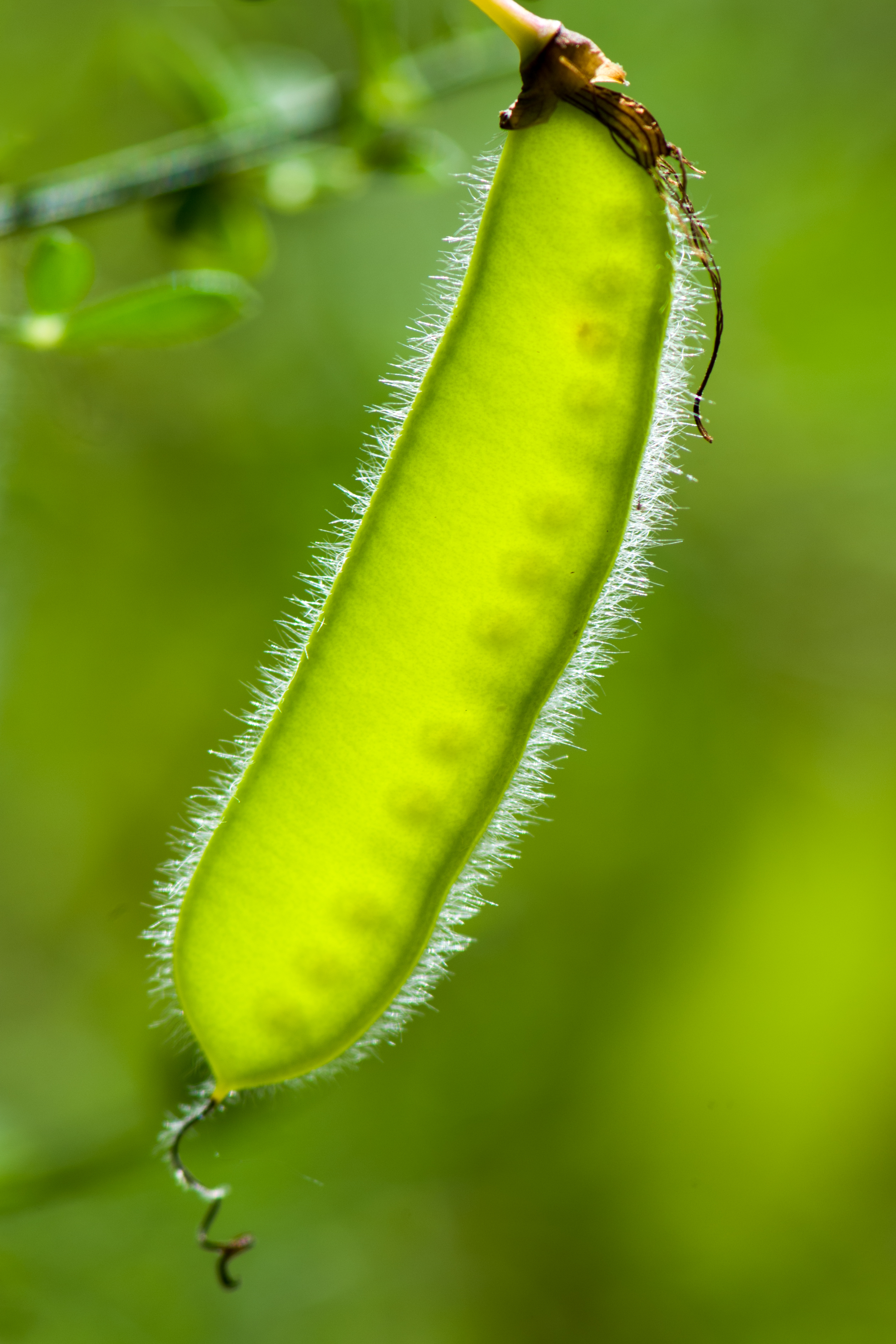 Parc naturel régional du Gâtinais français-Larchant